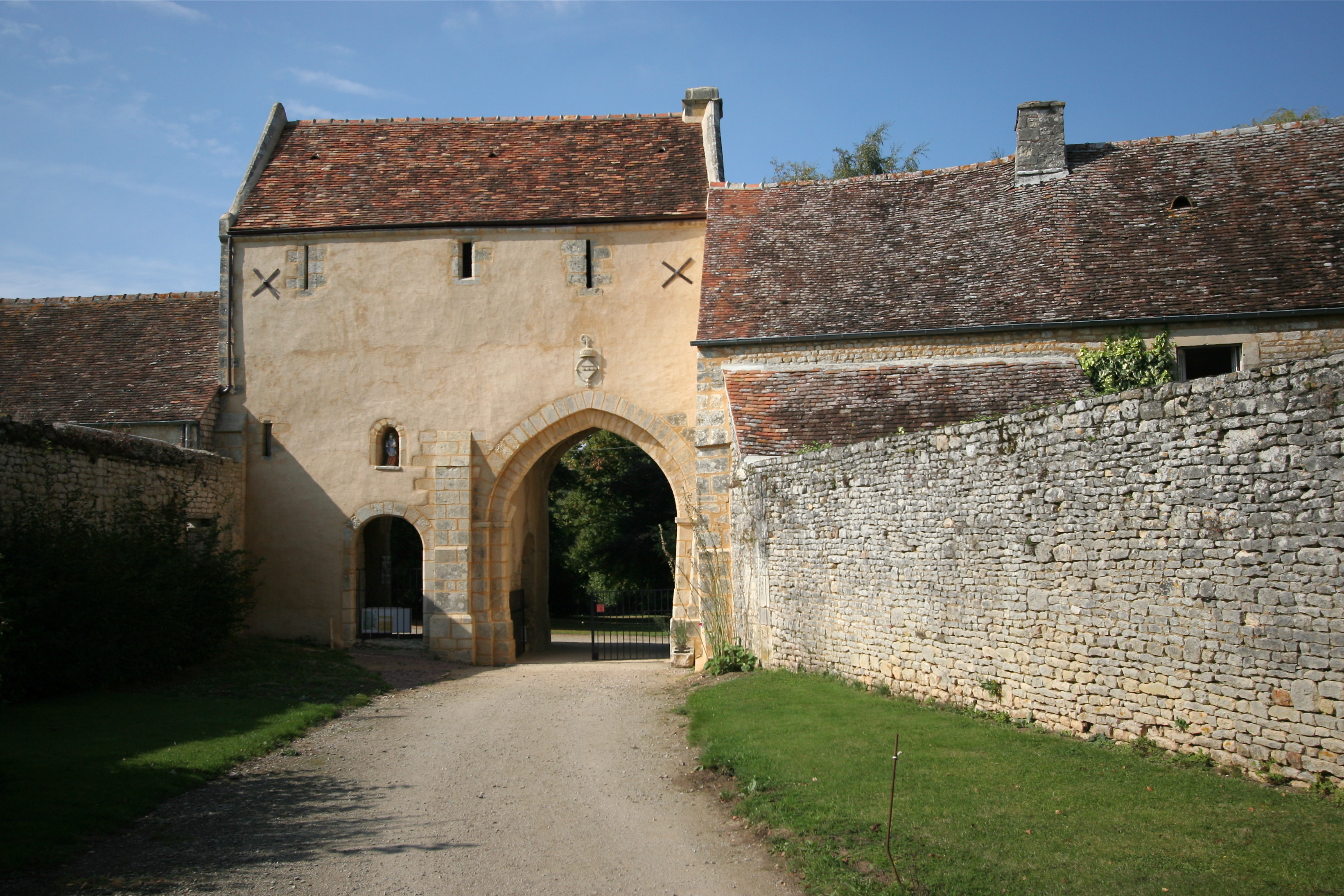 Entrée de l'abbaye cistercienne de Villers-Canivet (Calvados, France)